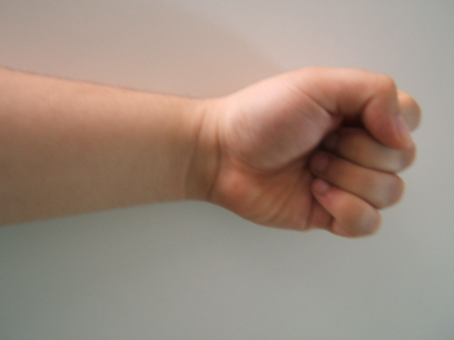 A fist